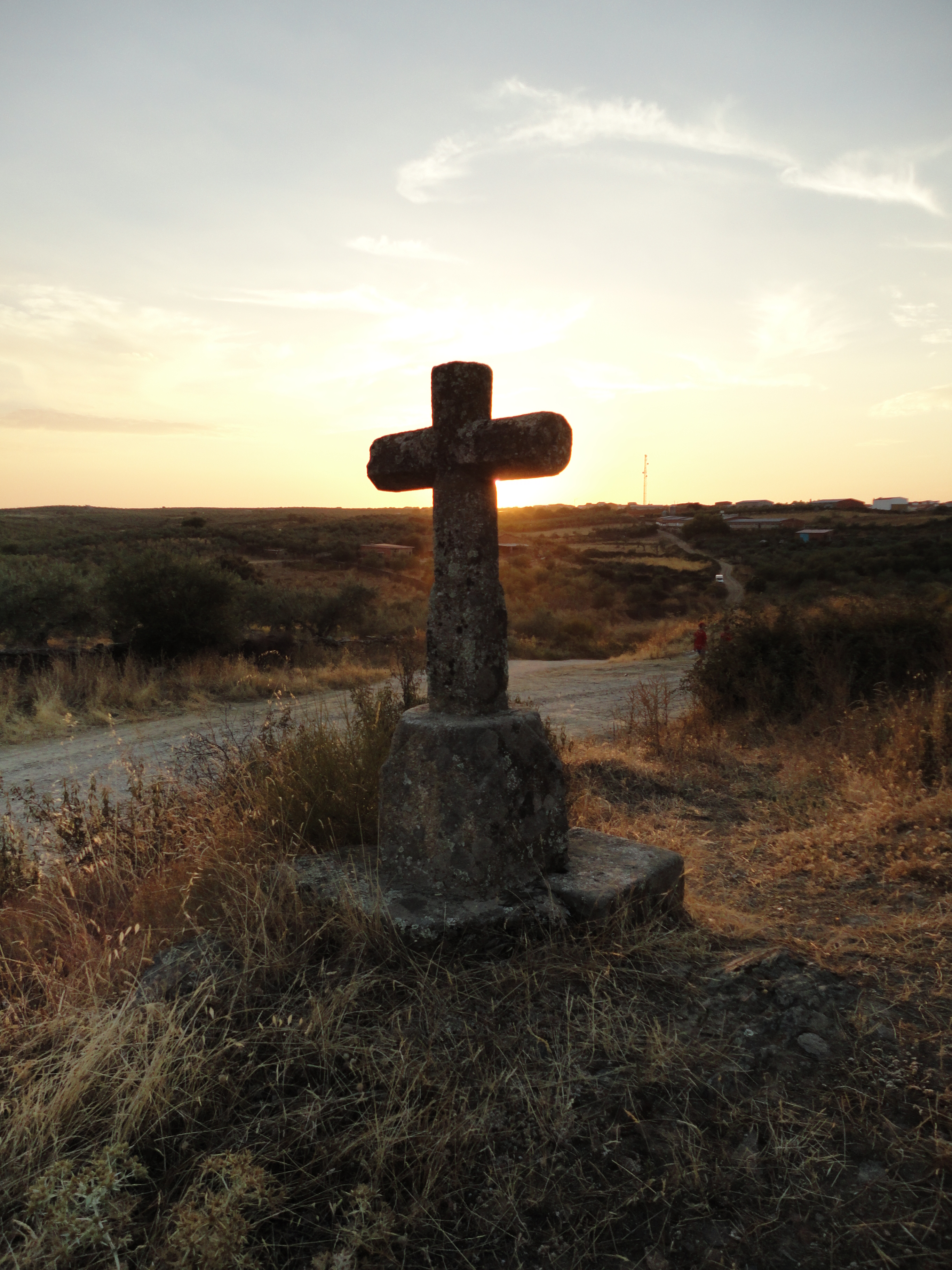 Cruz de la Ansomá, a las afueras de Montehermoso, en la provincia de Cáceres, España.